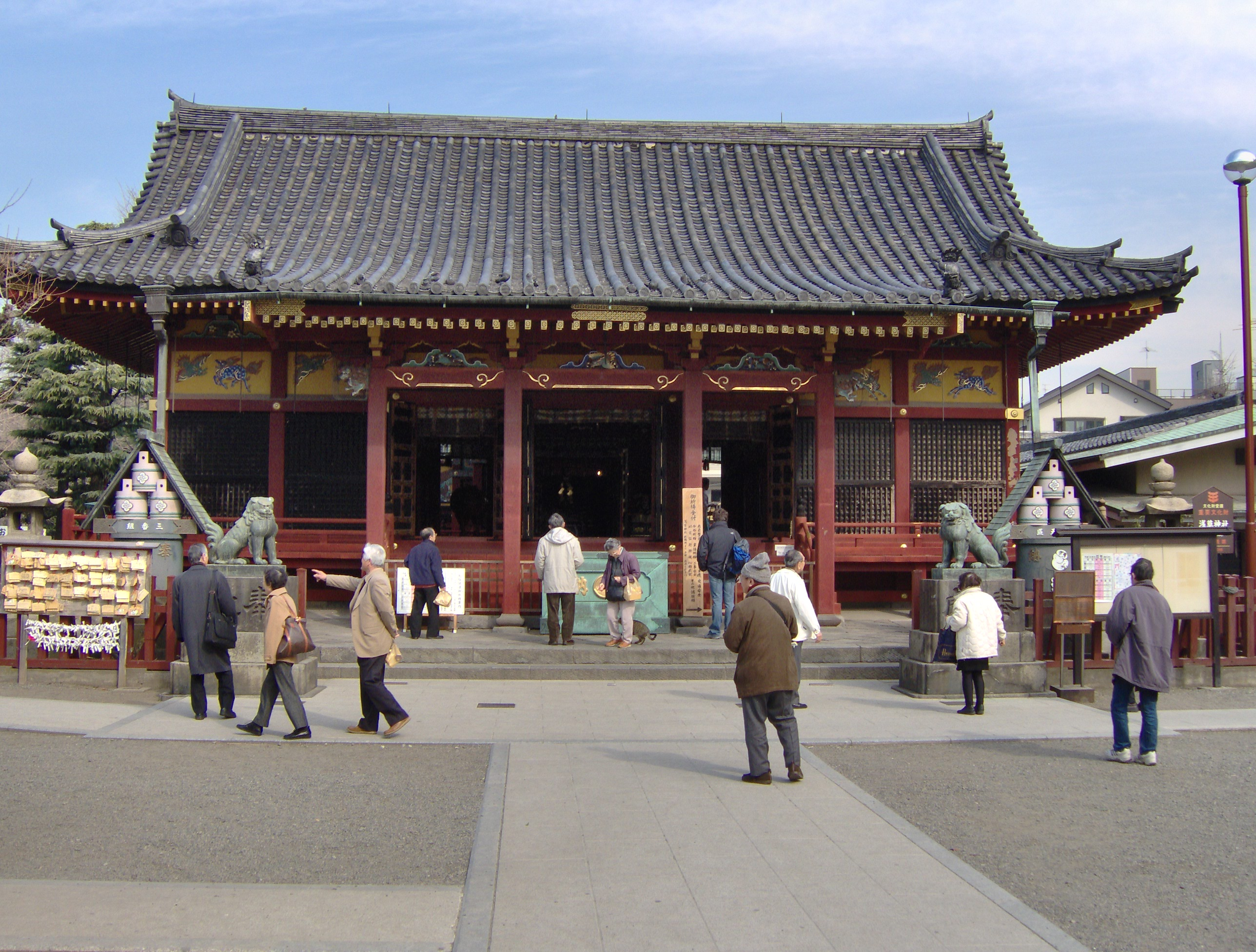 Sanctuaire d'Asakusa, Tôkyô, Japon